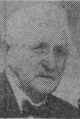 Arkitekten Einar Zachrison